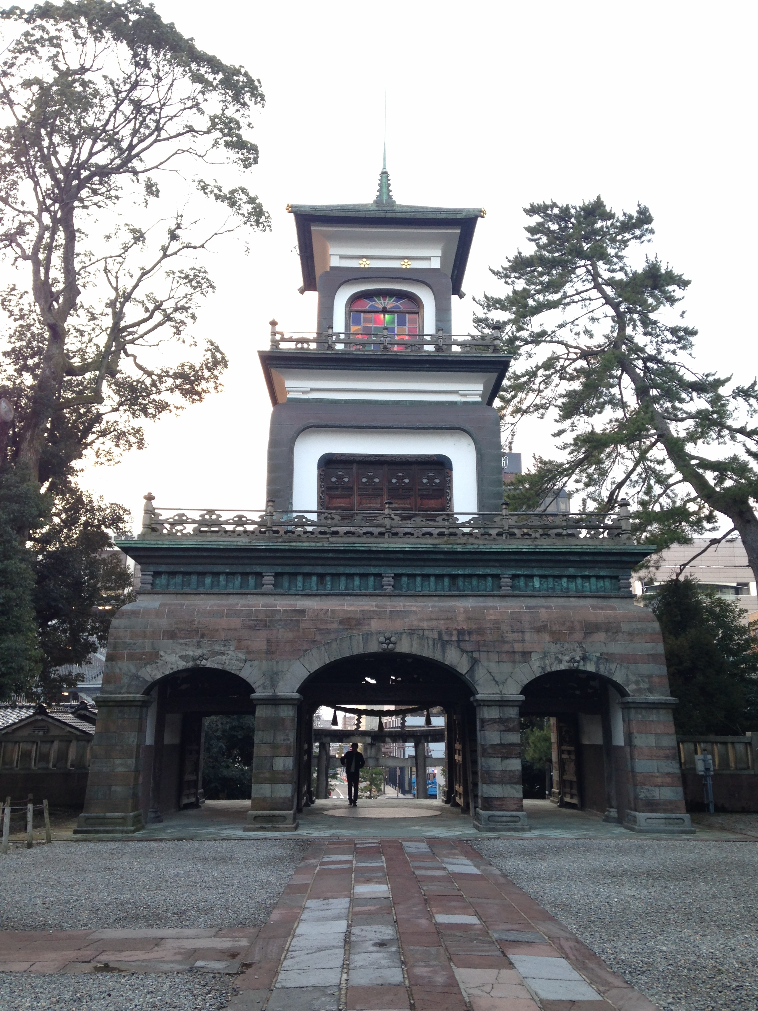 尾山神社の神門